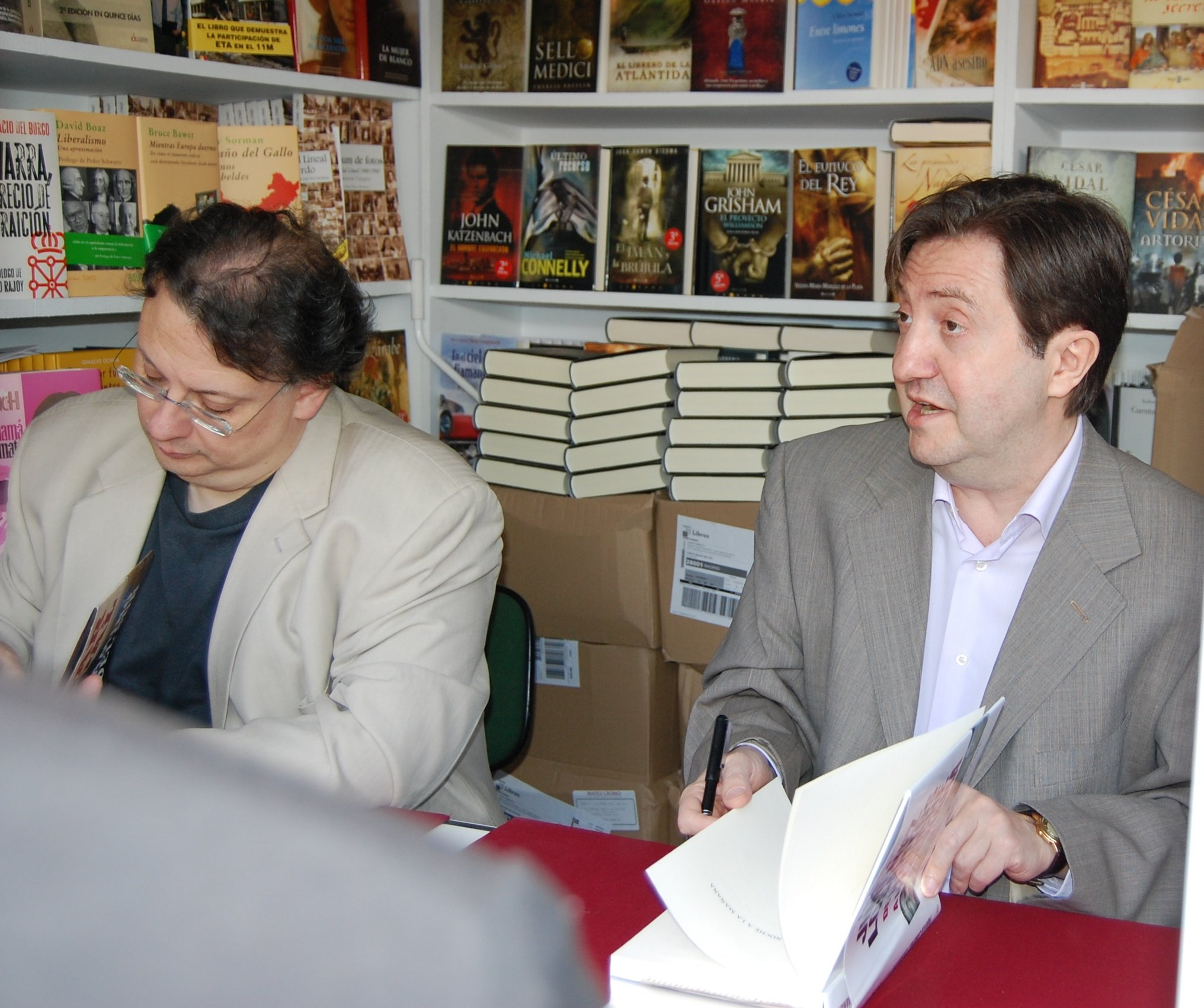 Federico Jiménez Losantos y César Vidal firman en la Feria del libro de Madrid. Junio 2007.